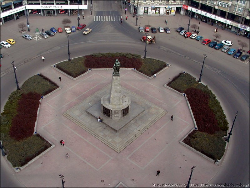 Lodz - Plac Wolności